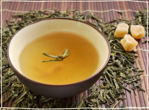 Najređi i najskuplji čaj iz porodice Camellia sinensis